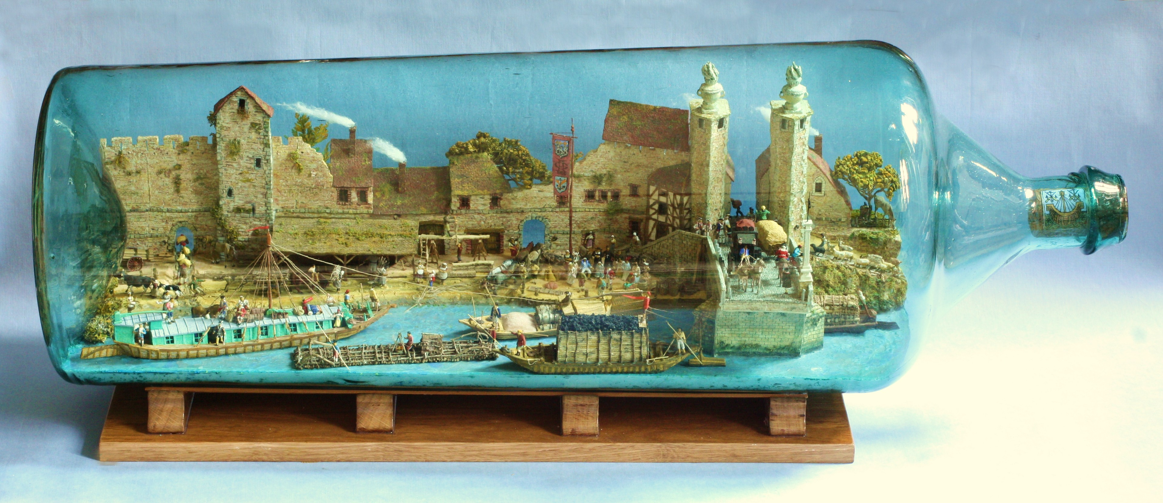 Le port fluvial de Villeneuve le Roi (sur Yonne depuis la révolution) à la fin de l’Ancien Régime. Grand et fragile flacon de verre ancien légèrement teinté vert, 30 litres, diamètre 25 cm, longueur 80 cm.